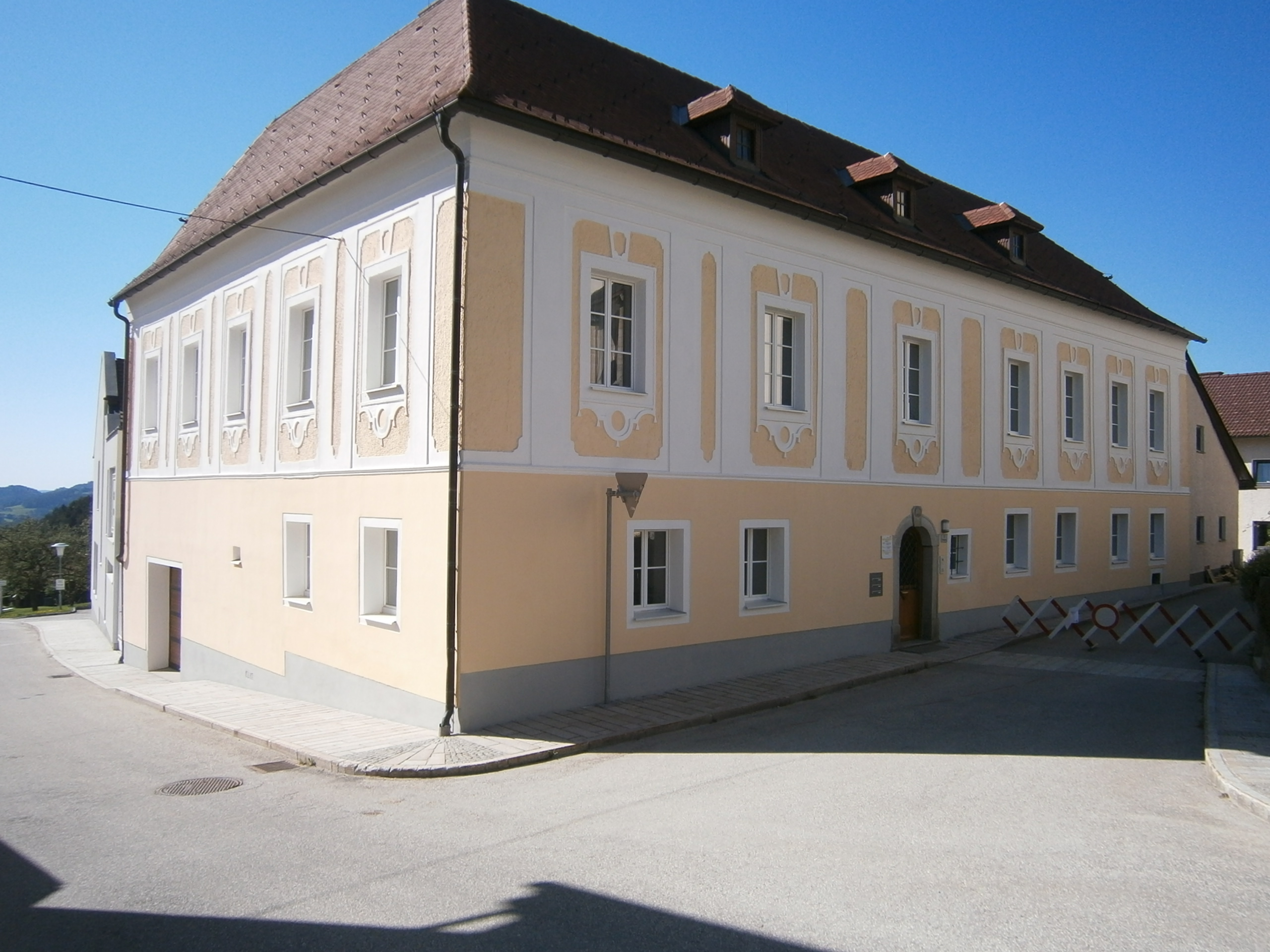 Object location48° 26′ 36.91″ N, 14° 40′ 37.1″ E